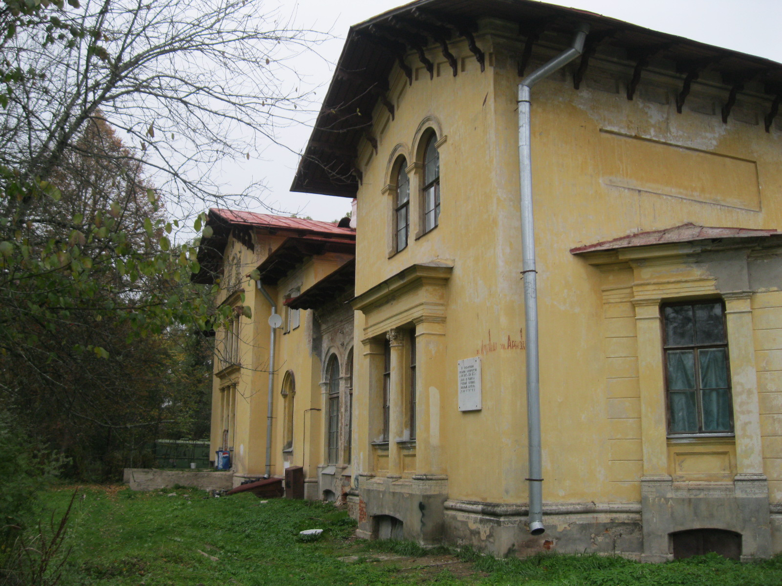 Охотничий дом (Санкт-Петербург и Лен.область, Тосно, посёлок Лисино-Корпус)